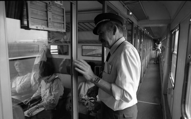 Juni 1988 Bonn, Fahrkartenkontrolleur